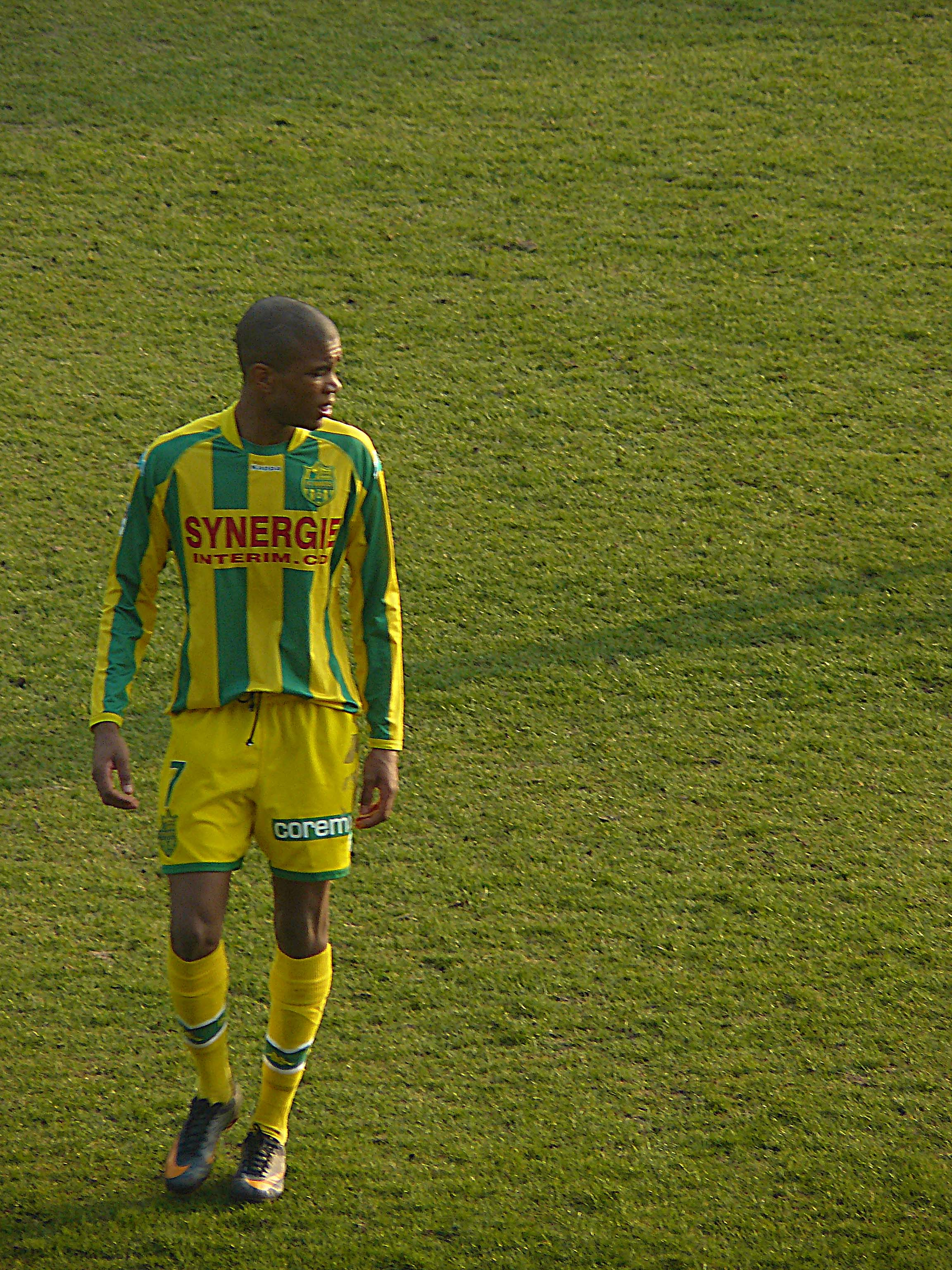 Loïc Nego, lors de la rencontre de CFA2 FC Nantes - Angers SCO, 5 mars 2011